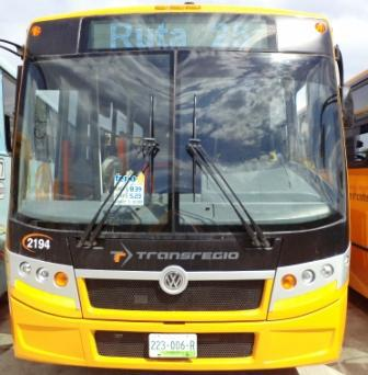 Ruta 25 de Transregio